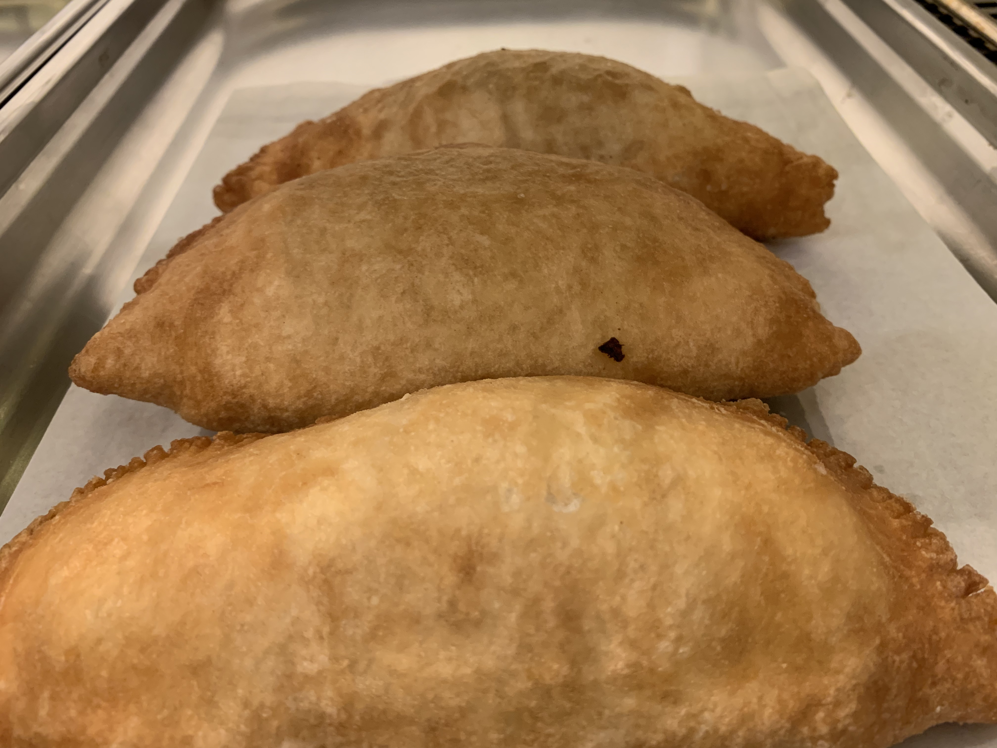 Panzerotti chez PanzerotTiamo (Lyon).